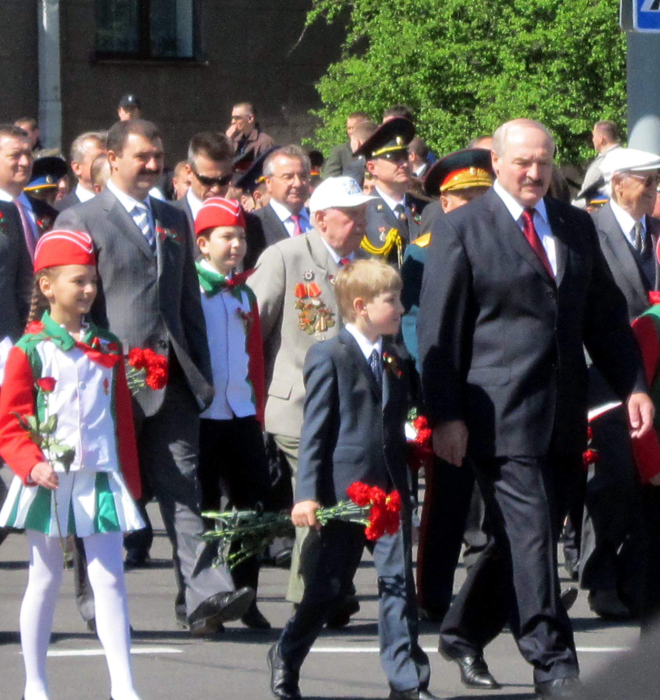 Президент РБ А. Г. Лукашенко с сыном Николаем на параде Победы. Сзади в сером костюме с полосатым галстуком - сын Виктор.